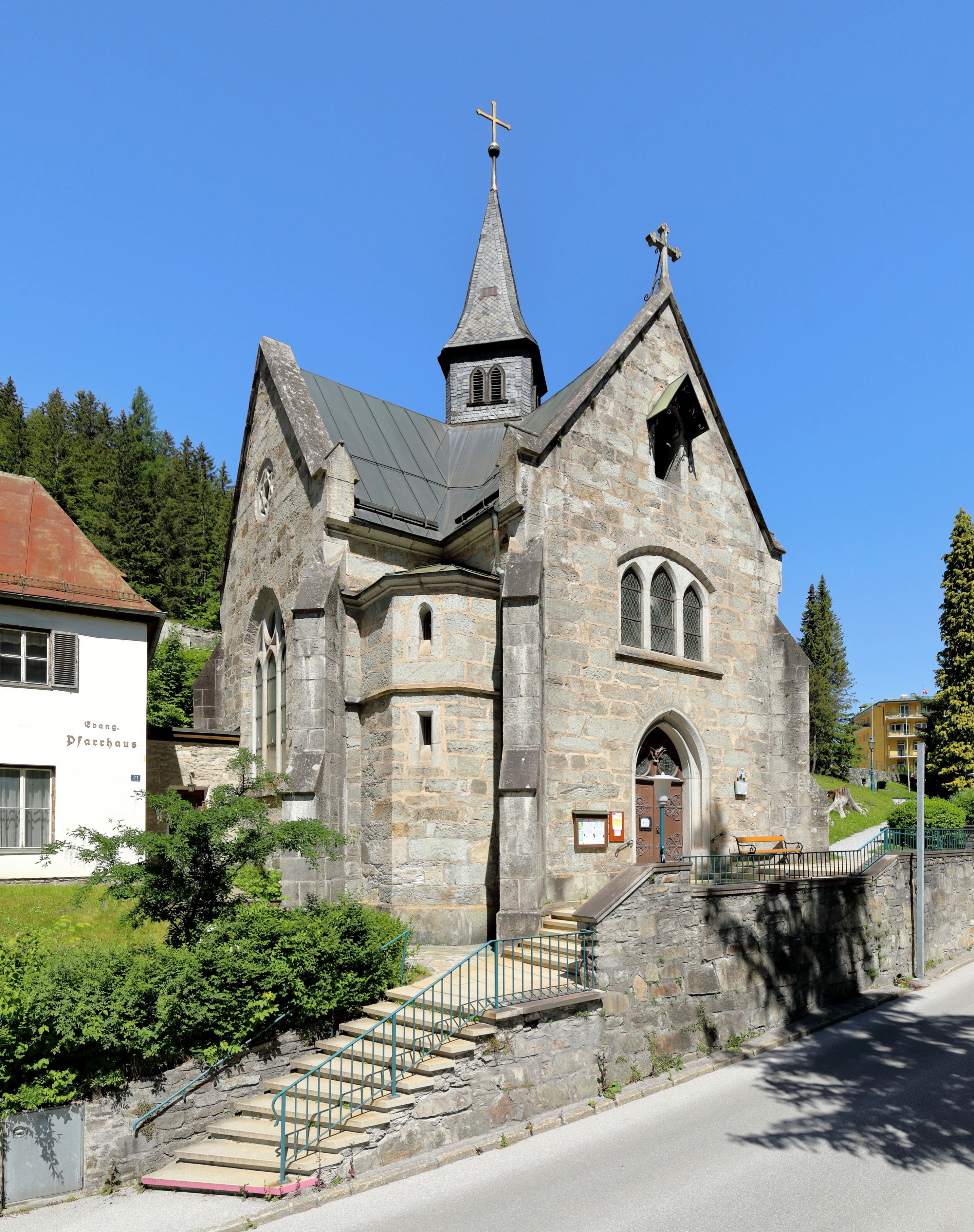 Südostansicht der evangelischen Christophoruskirche in der Salzburger Gemeinde Bad Gastein. Der steinschichtige Quaderbau über Kreuzgrundriss mit zentralem Glockenturm und im neugotischen Stil wurde ab 1868 (Grundsteinlegung am 19. Juli) nach Plänen des Berliner Oberbaurats Wilhelm Salzenberg (1803-1887) errichtet und am 6. Juli 1872 geweiht.